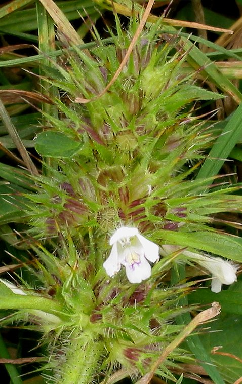 (nl: Gewone hennepnetel bloem) Galeopsis tetrahit flower